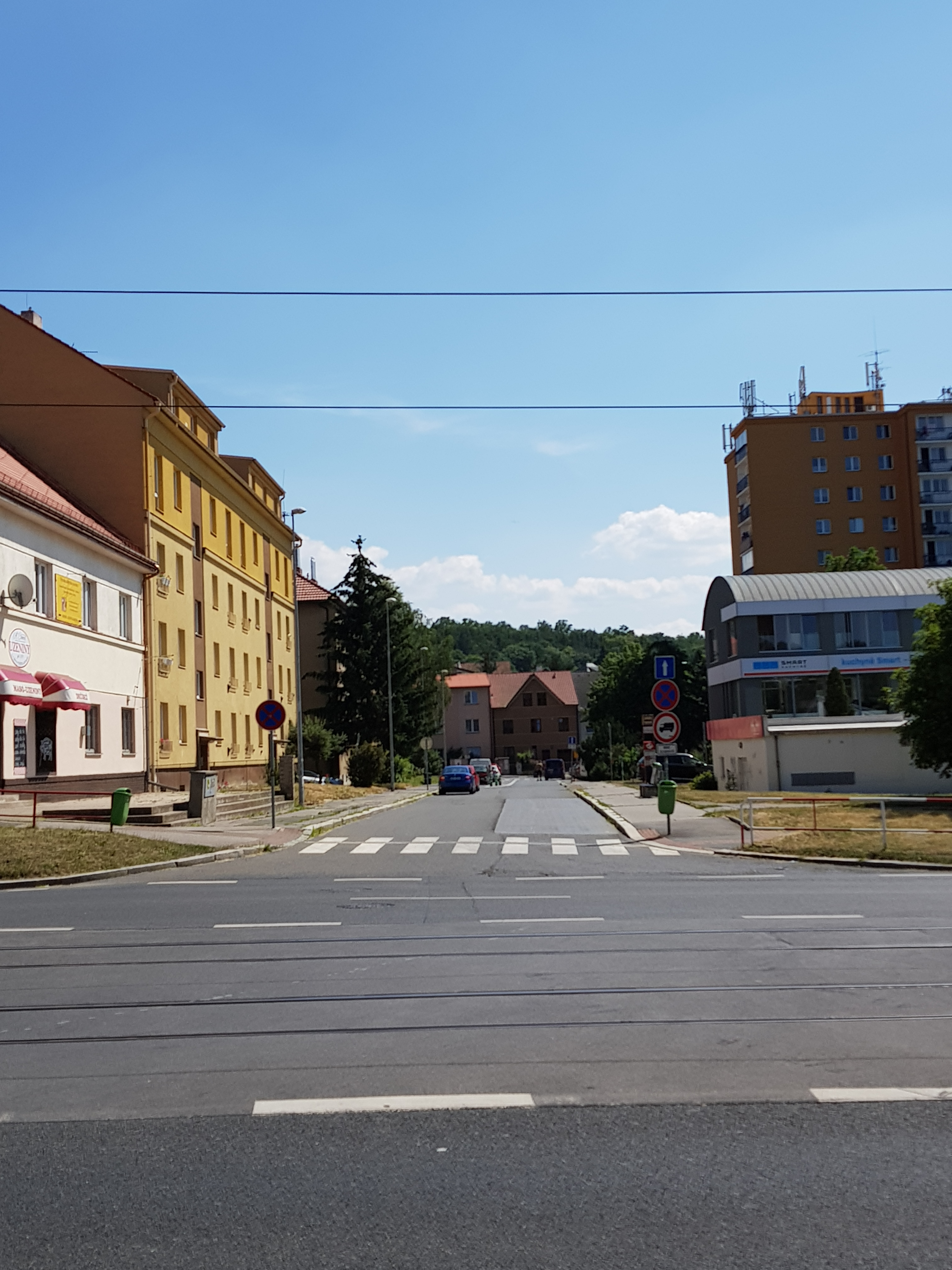 Ulice Chvalská v Praze-Hloubětíně